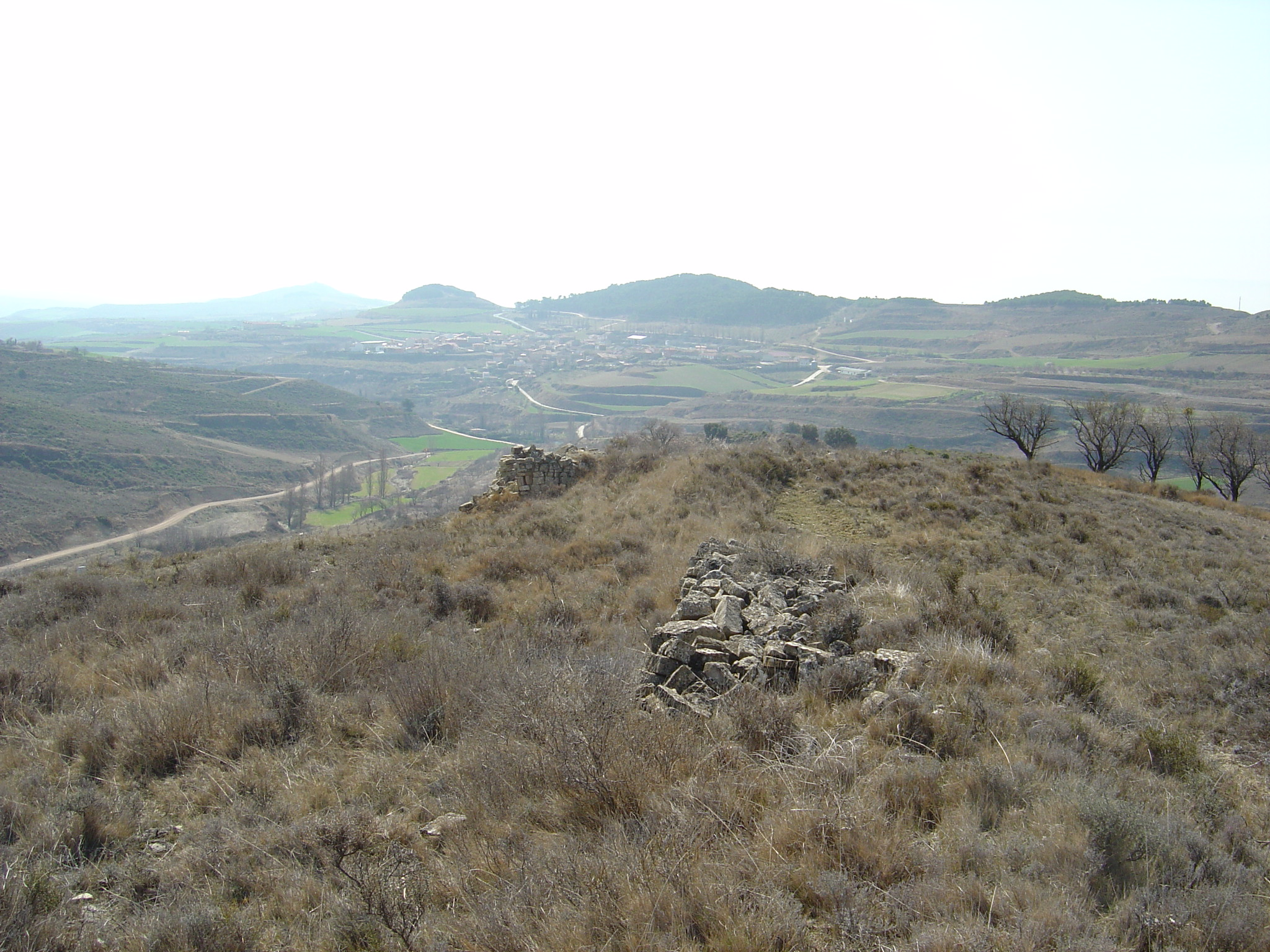 Desde el Norte con el cerro Arbanta al fondo. Bargota. Navarra. Spanien. Cornava own work 9.4.2007